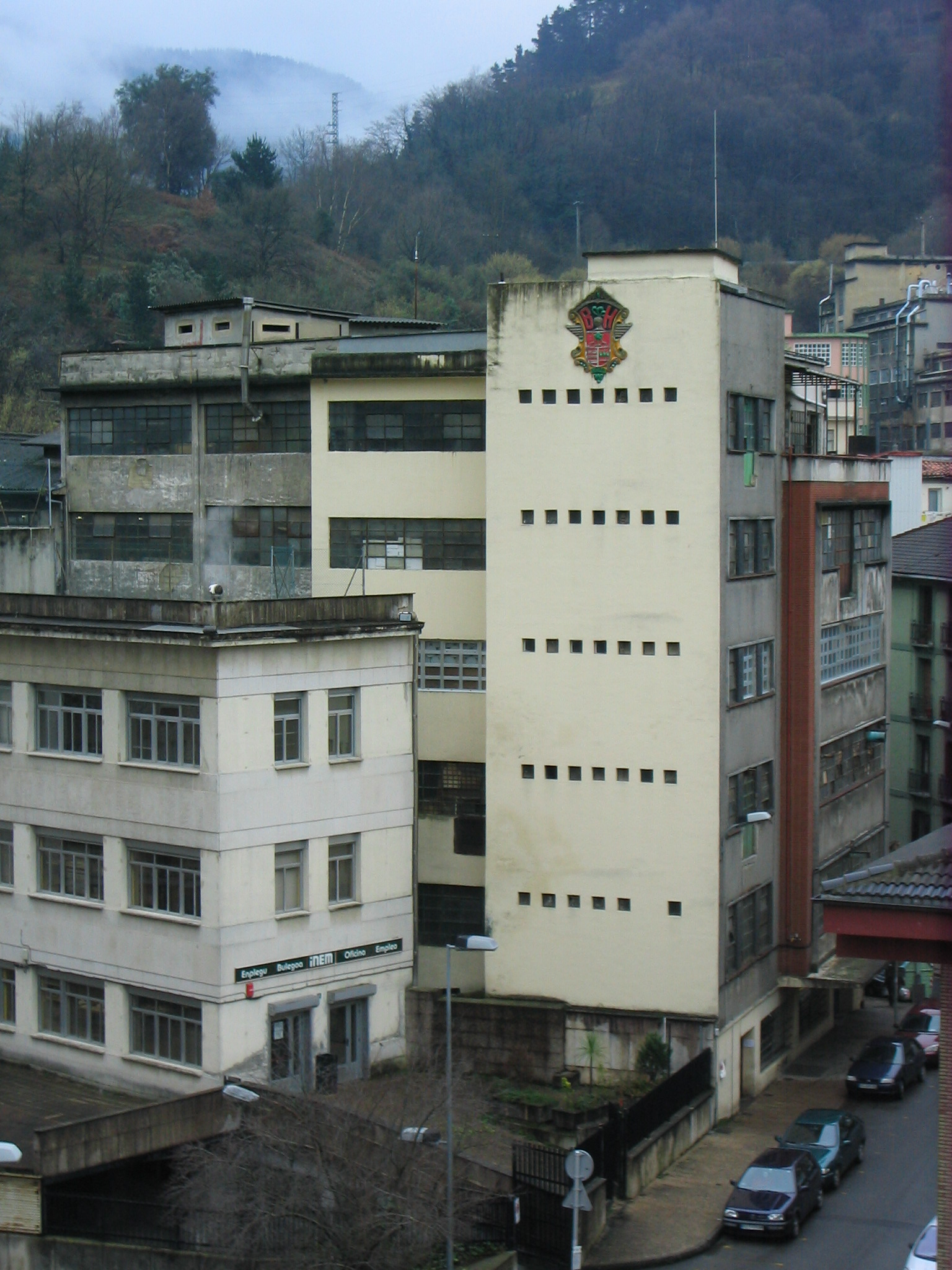 Fachada de las antiguas instalaciones de la empresa BH (Beistegui Hermanos) en Eibar.